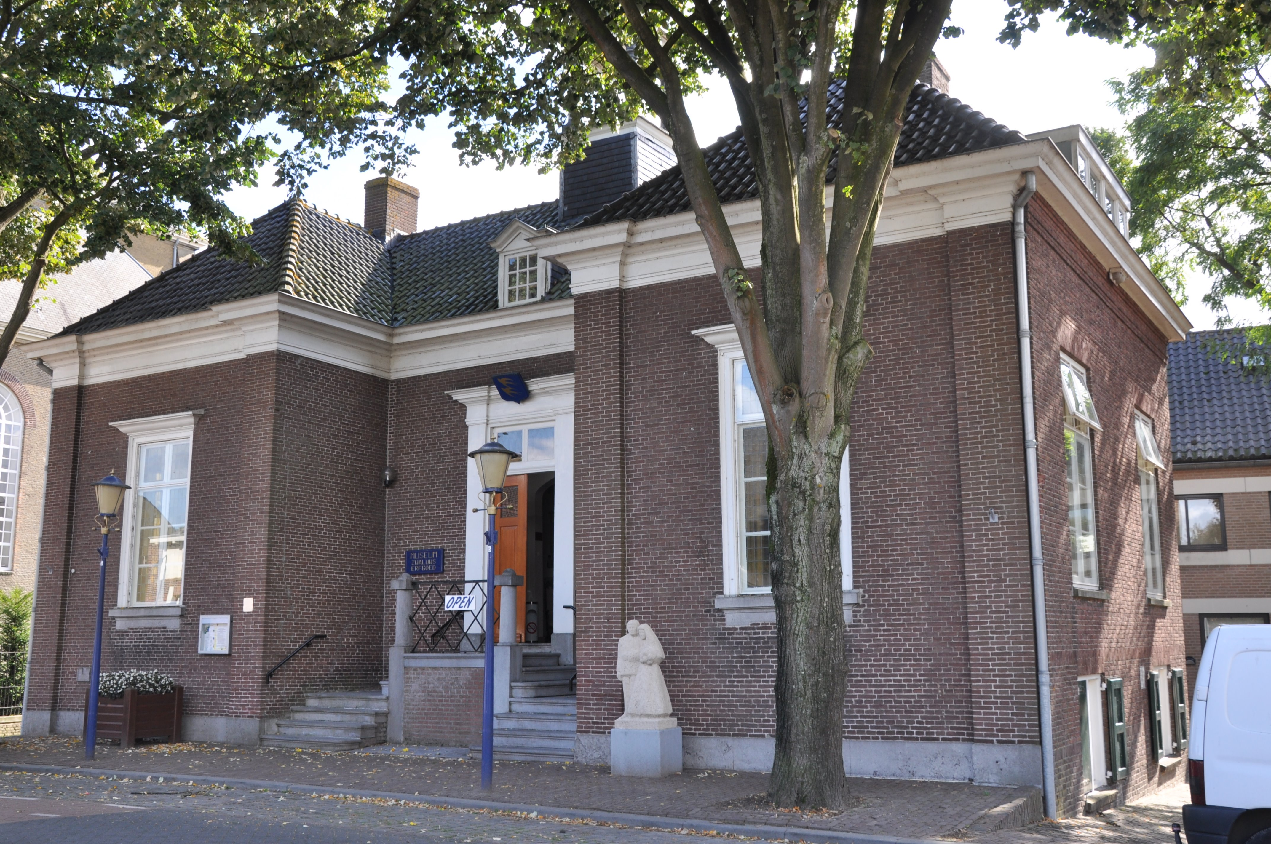 DSC_0066 Bestuursgebouw (voormalig raadhuis), Raadhuisstraat 5, Hooge Zwaluwe, rm 22206